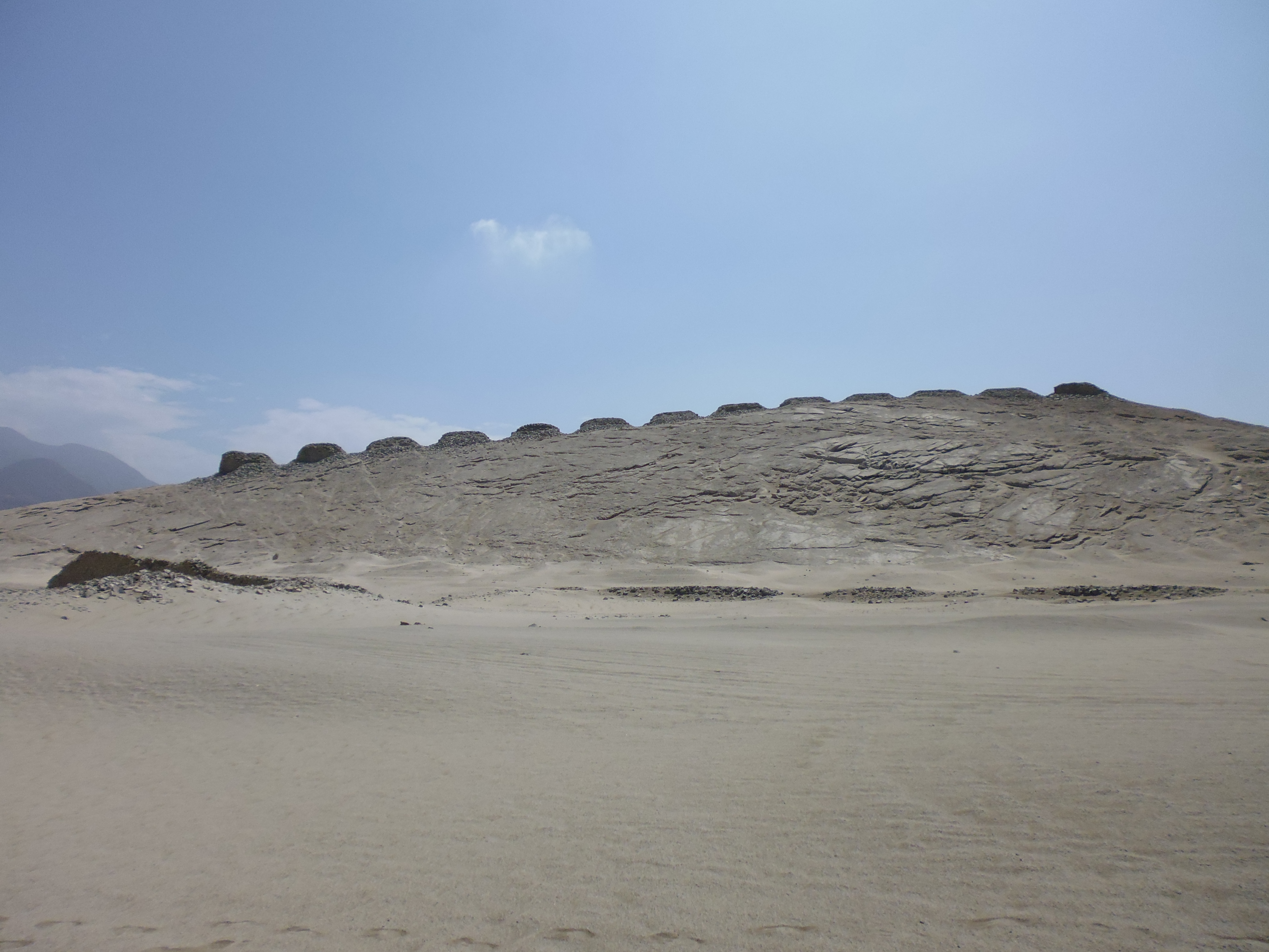 El observatorio astronómico de Chanquillo está ubicado en el valle de San Rafael en la Provincia de Casma Ancash Perú, en la imagen se observa las trece torres construidas con piedras en la cima del cerro.